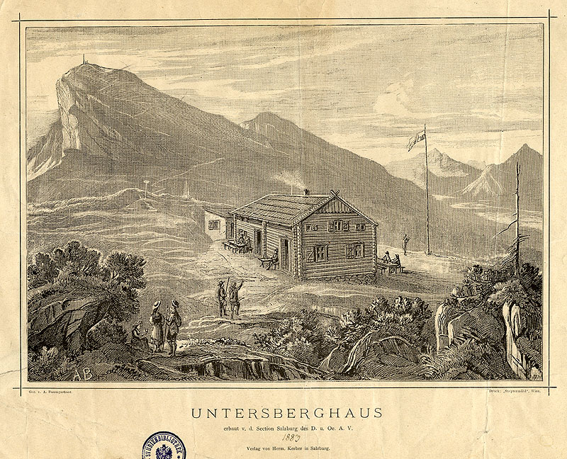 Untersberghaus (ältester Zustand des Zeppezauerhauses), Lithographie, 1883